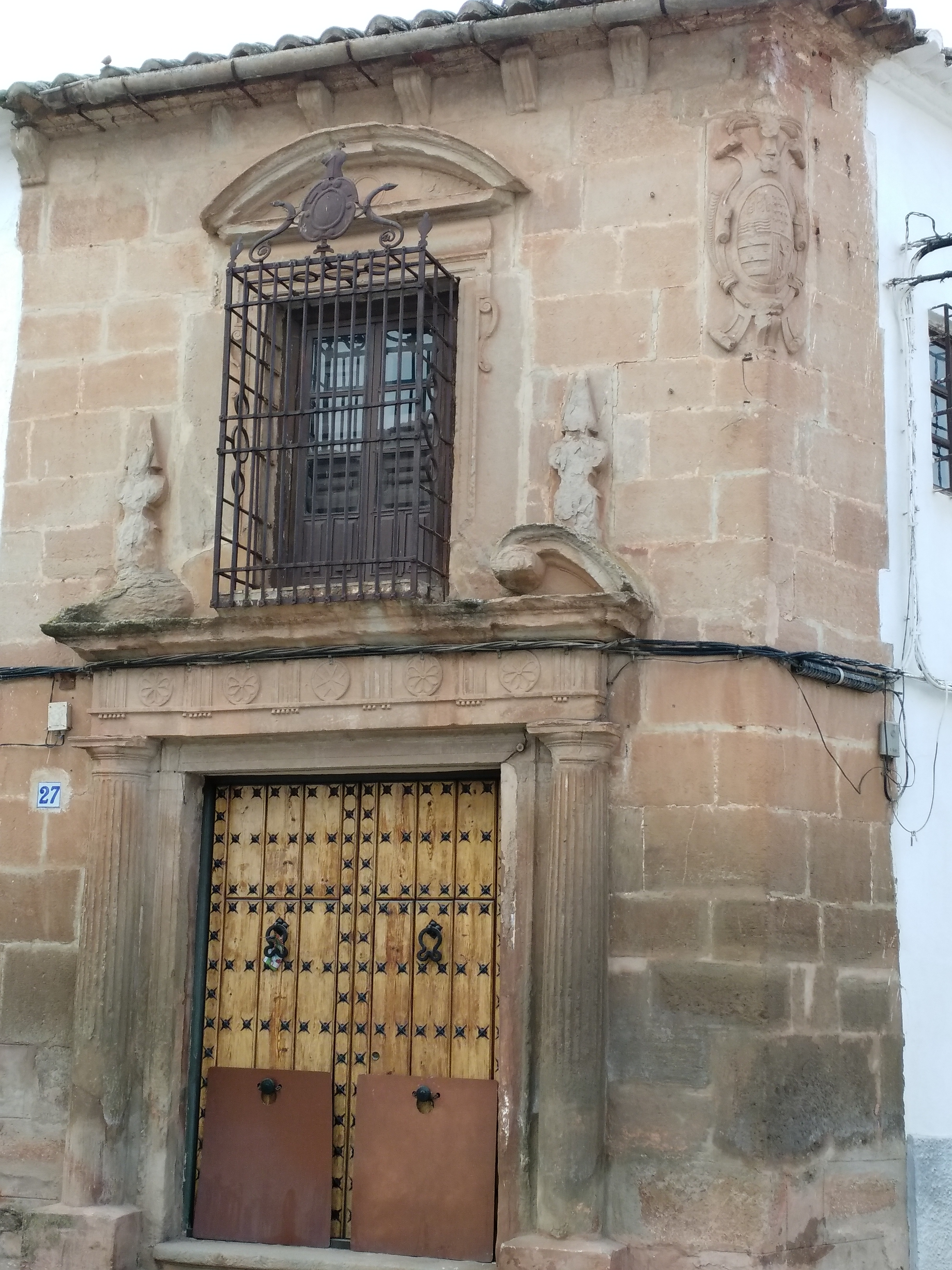 Fachada del Palacio del Marqués de Entrambasaguas.